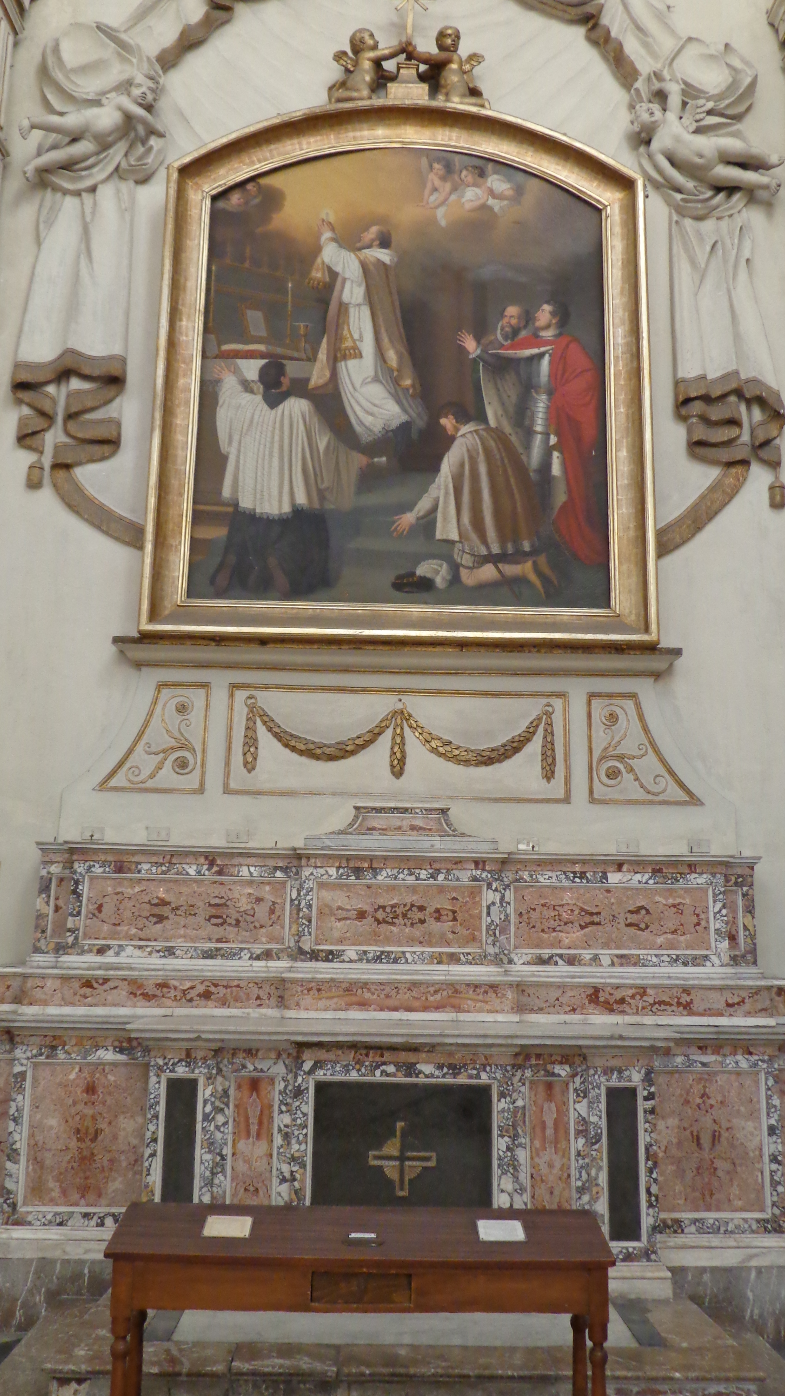 Altare